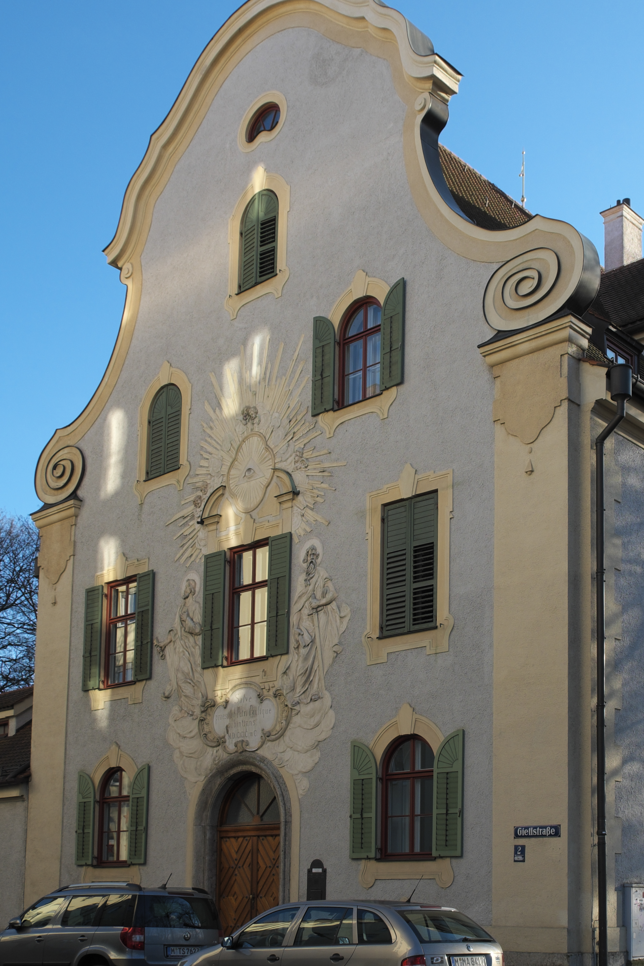 Pfarrhaus der katholischen Pfarrei Heilig-Kreuz (Giesing) in der Gietlstraße 2 in Obergiesing im Stadtbezirk Obergiesing-Fasangarten in München (Bayern/Deutschland)